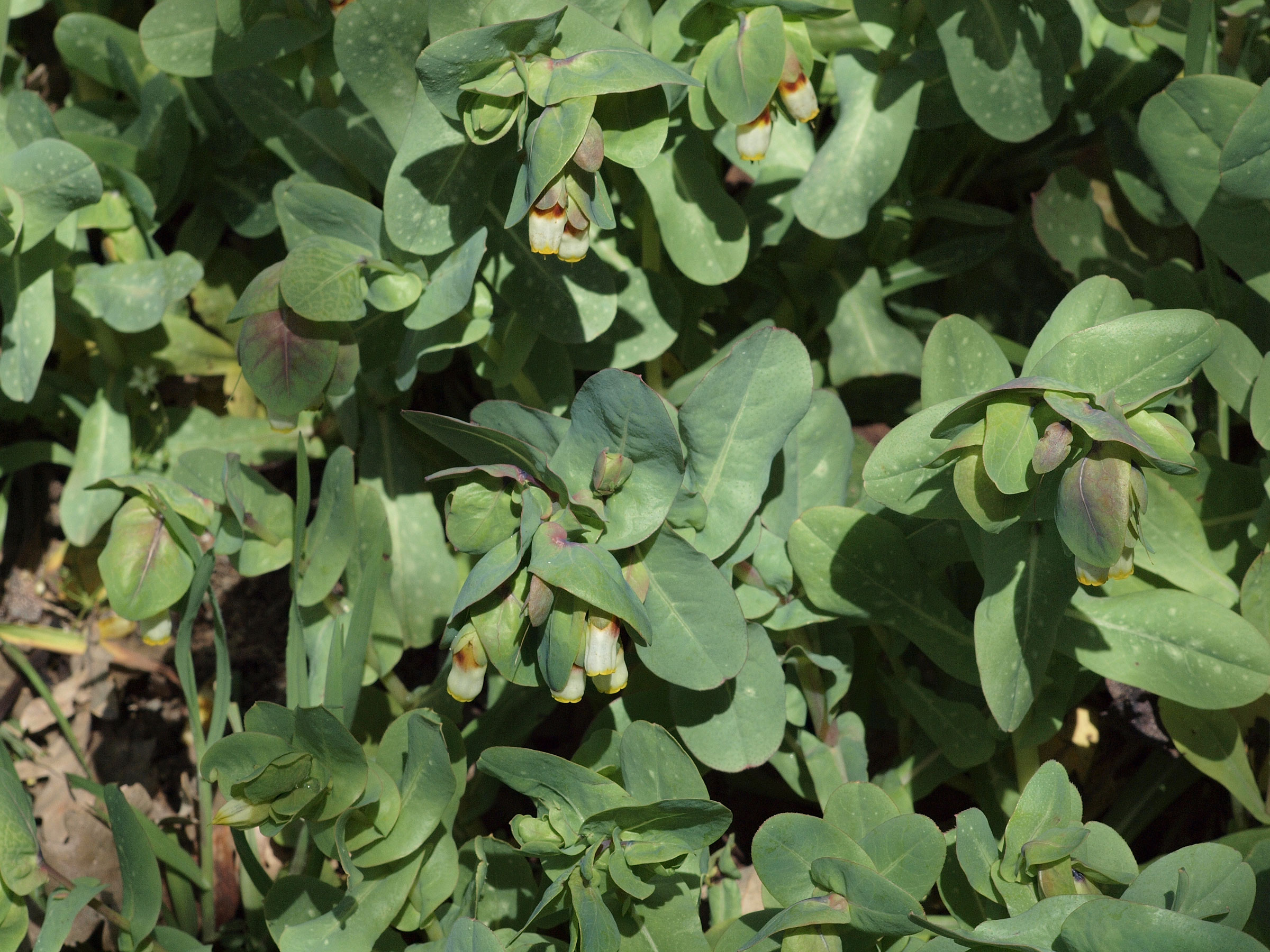 Cerinthe gymnandra, prado nitrófilo, a la sombra. Losar de la Vera (Cáceres, España).